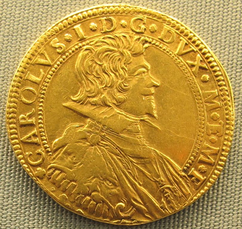 Mantova, 4 doppie di carlo I di gonzaga-nevers, 1627-1637